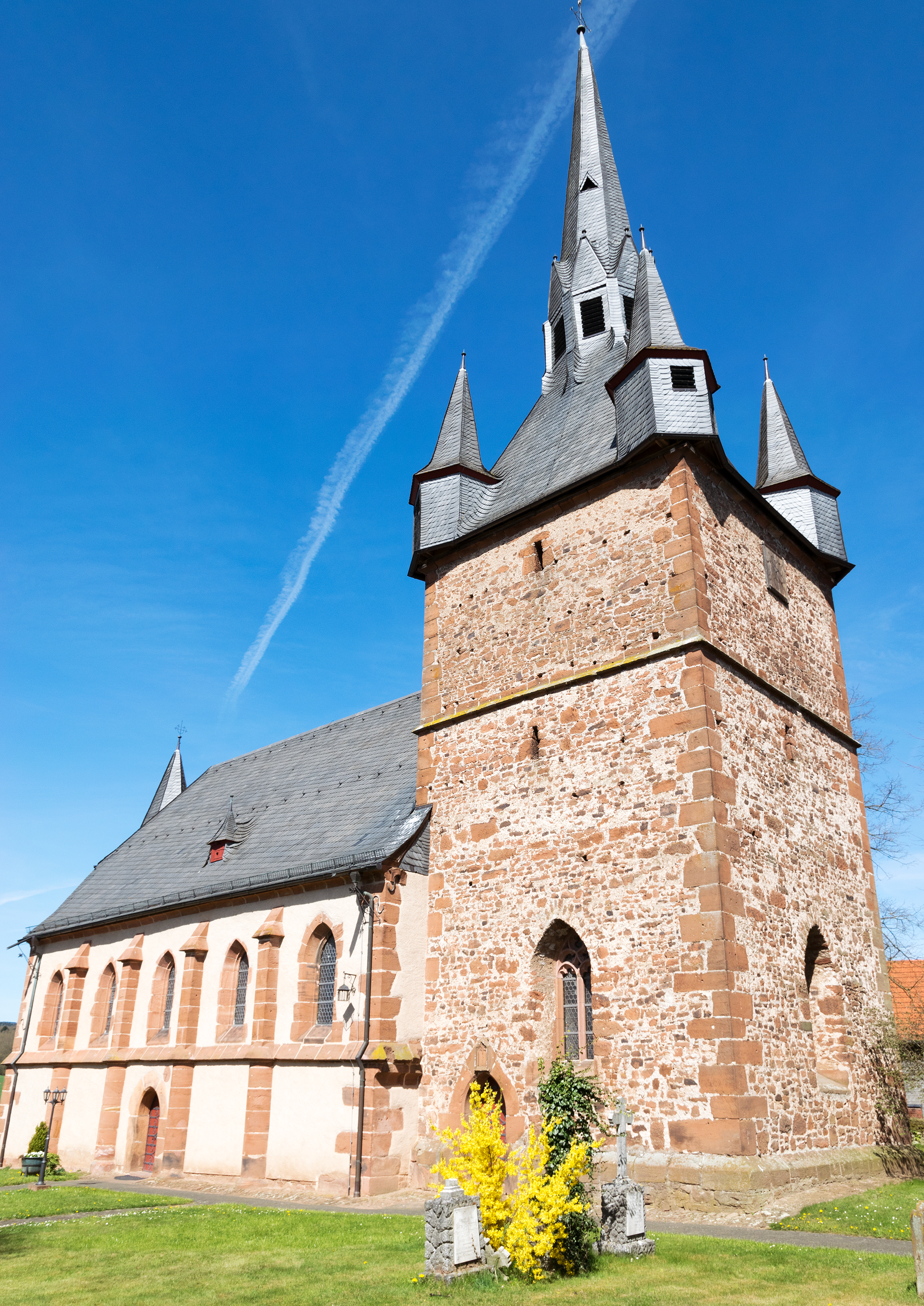 Die ev.-luth. Kirche in Niederasphe